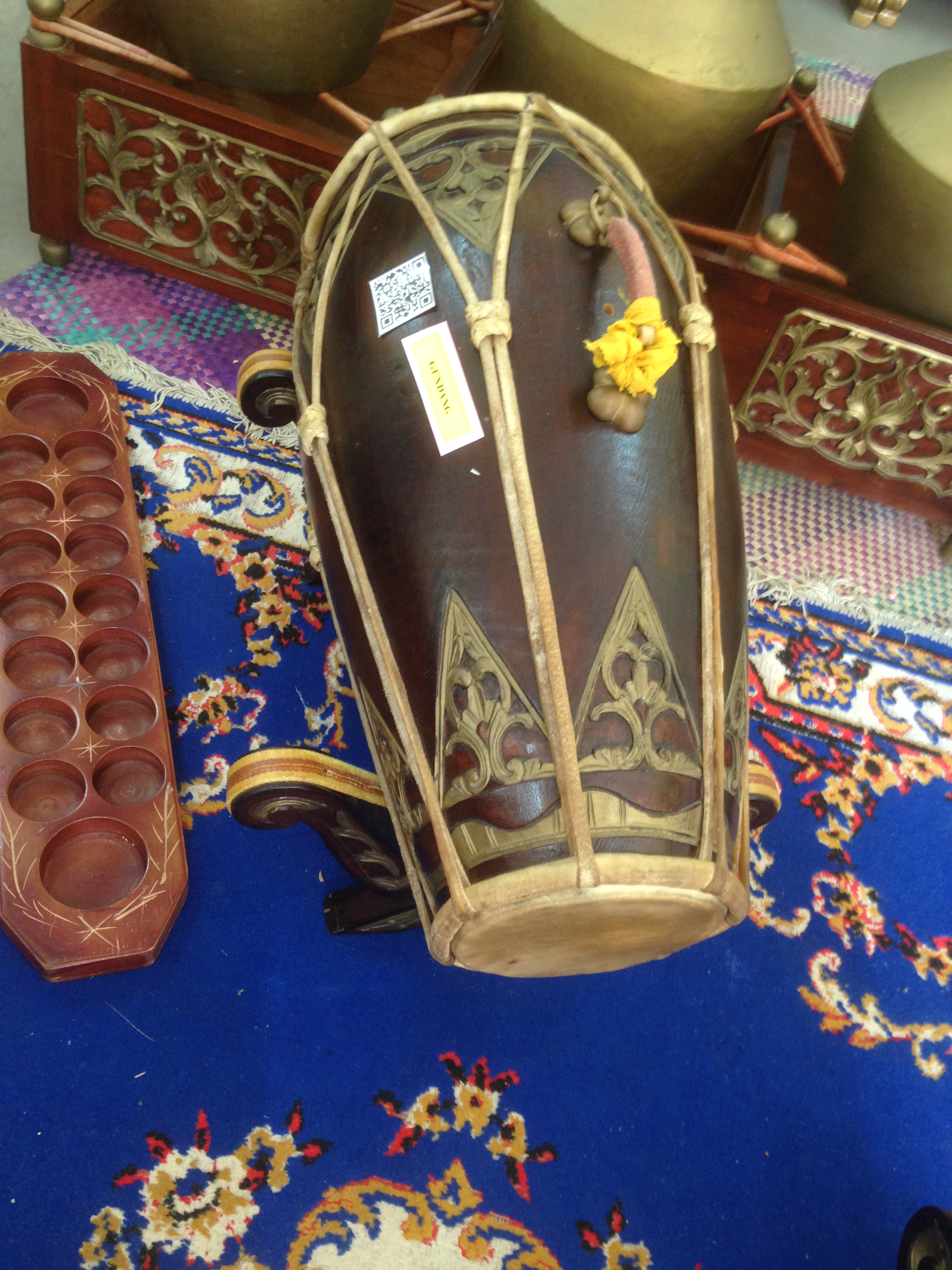 GENDANG